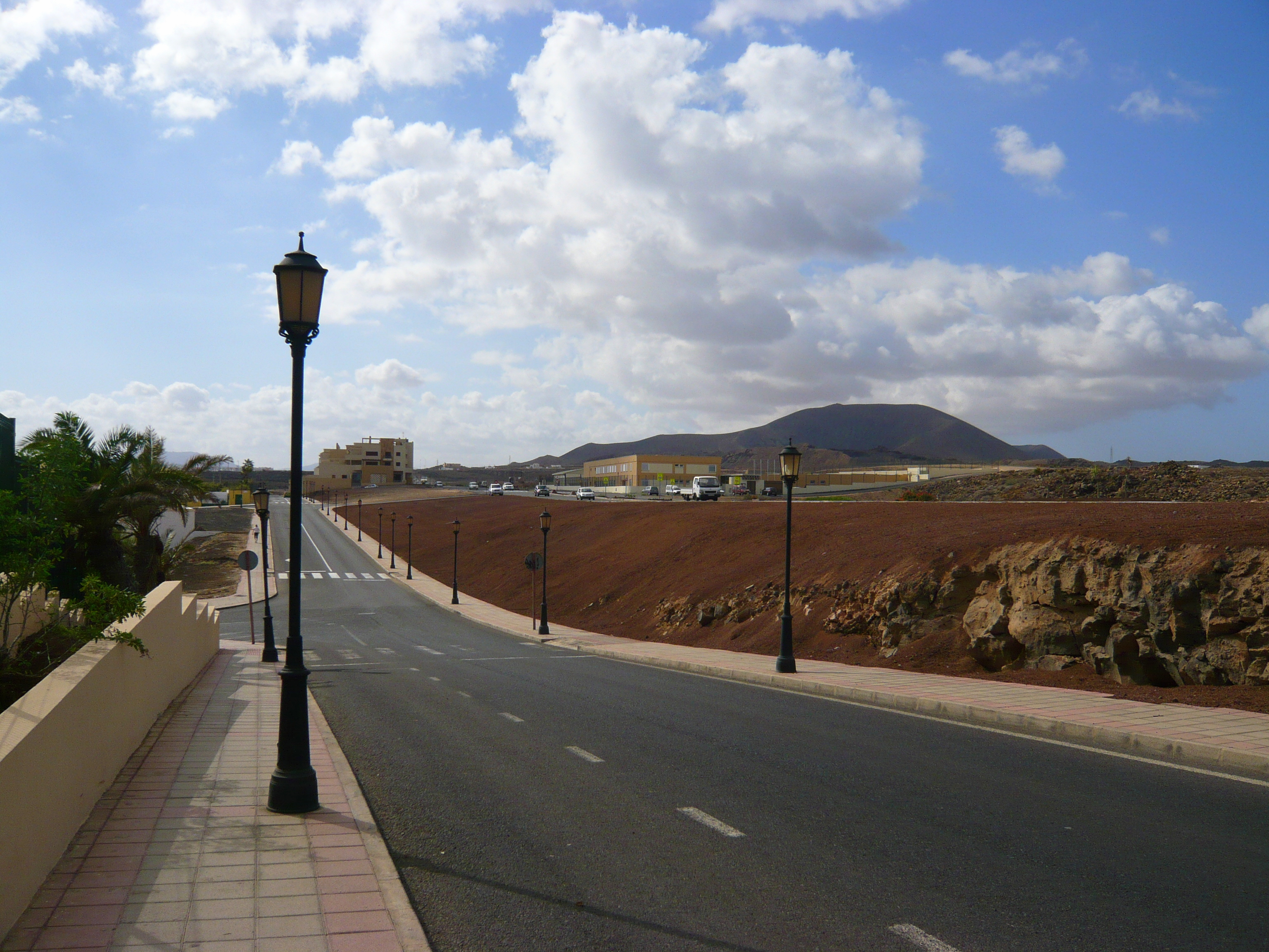 Corralejo